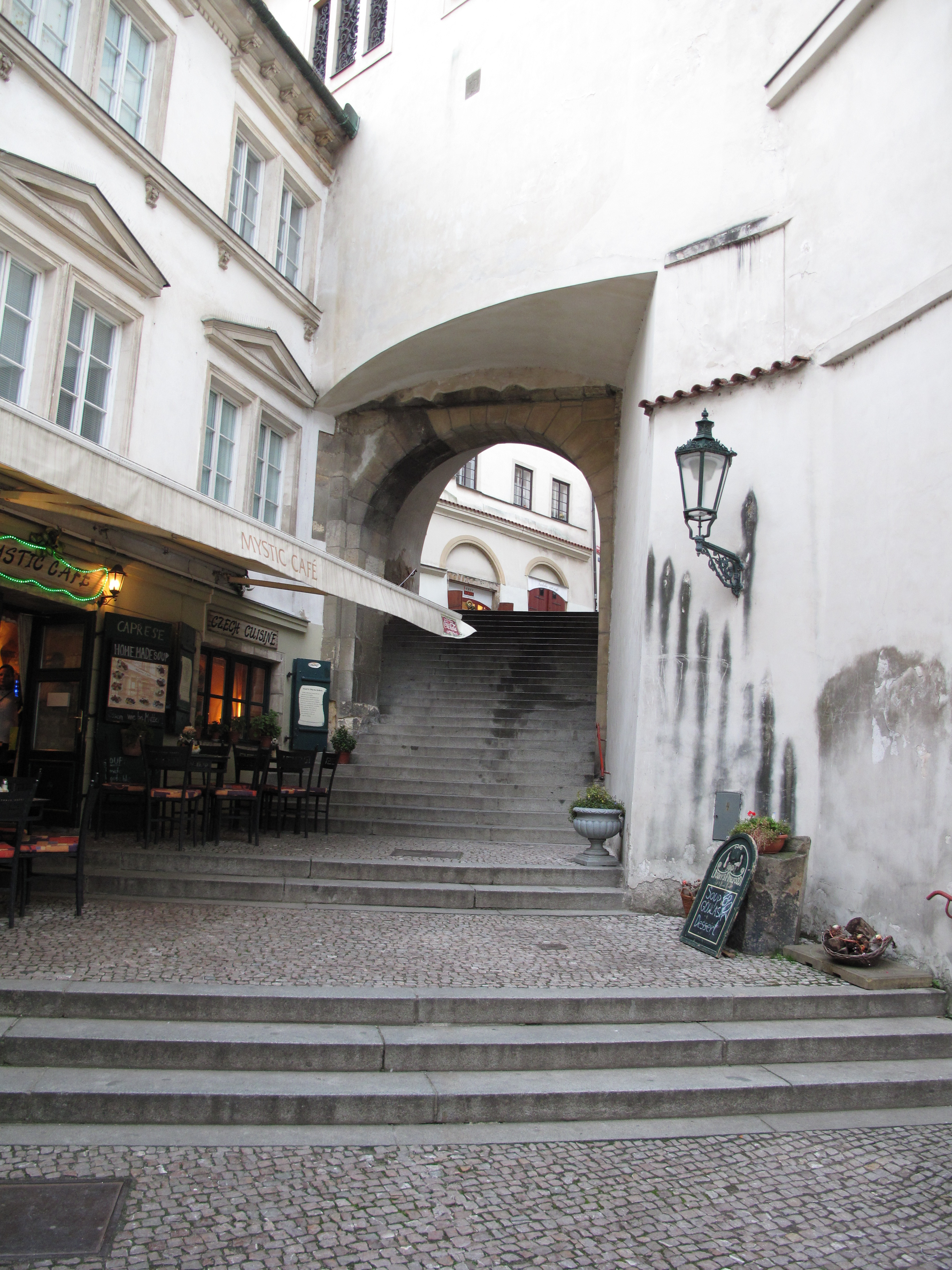 Hradčany, Praha, Česká republika.